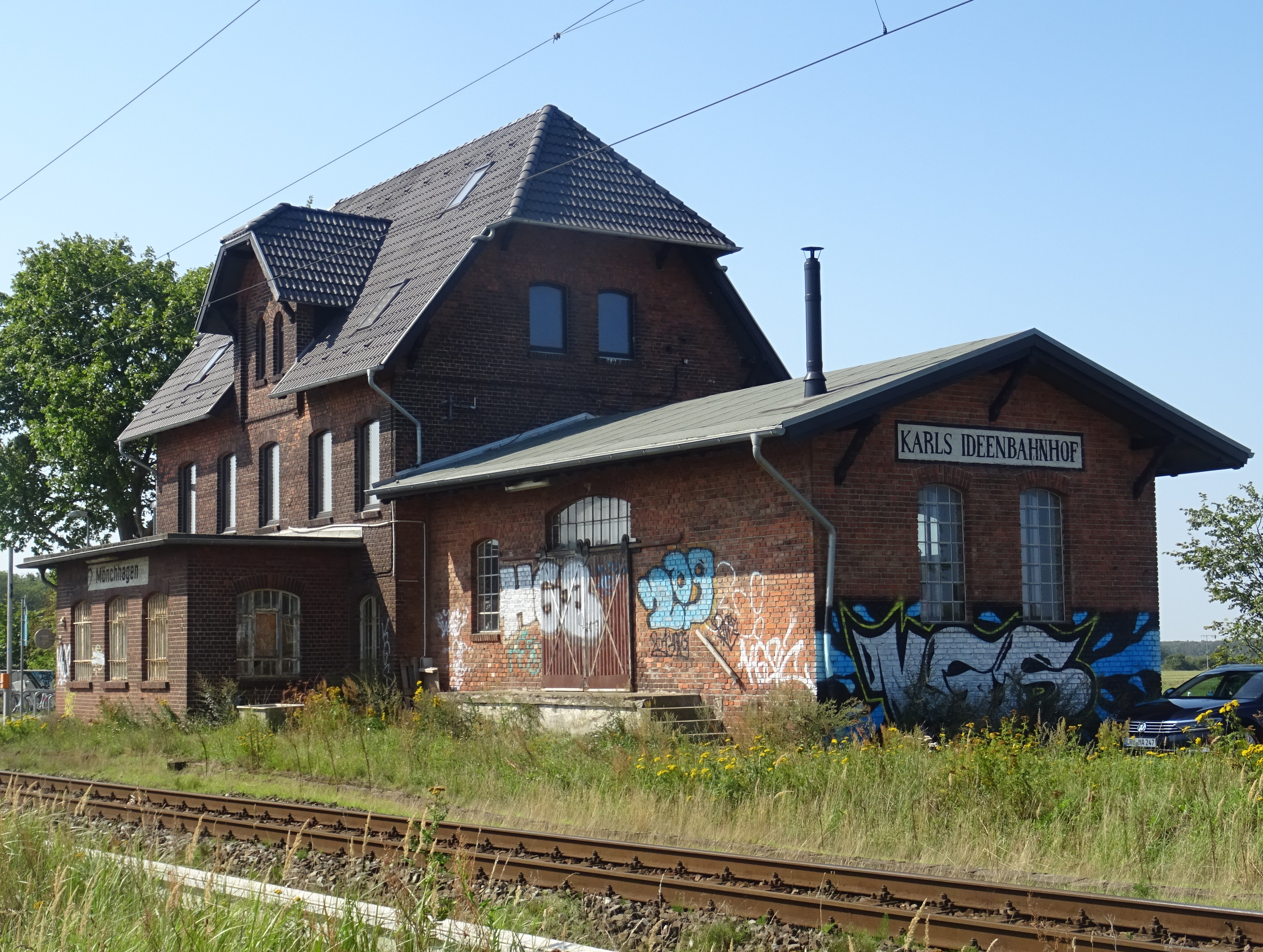 Bf Mönchhagen, denkmalgeschützt, Ansocht von Südosten